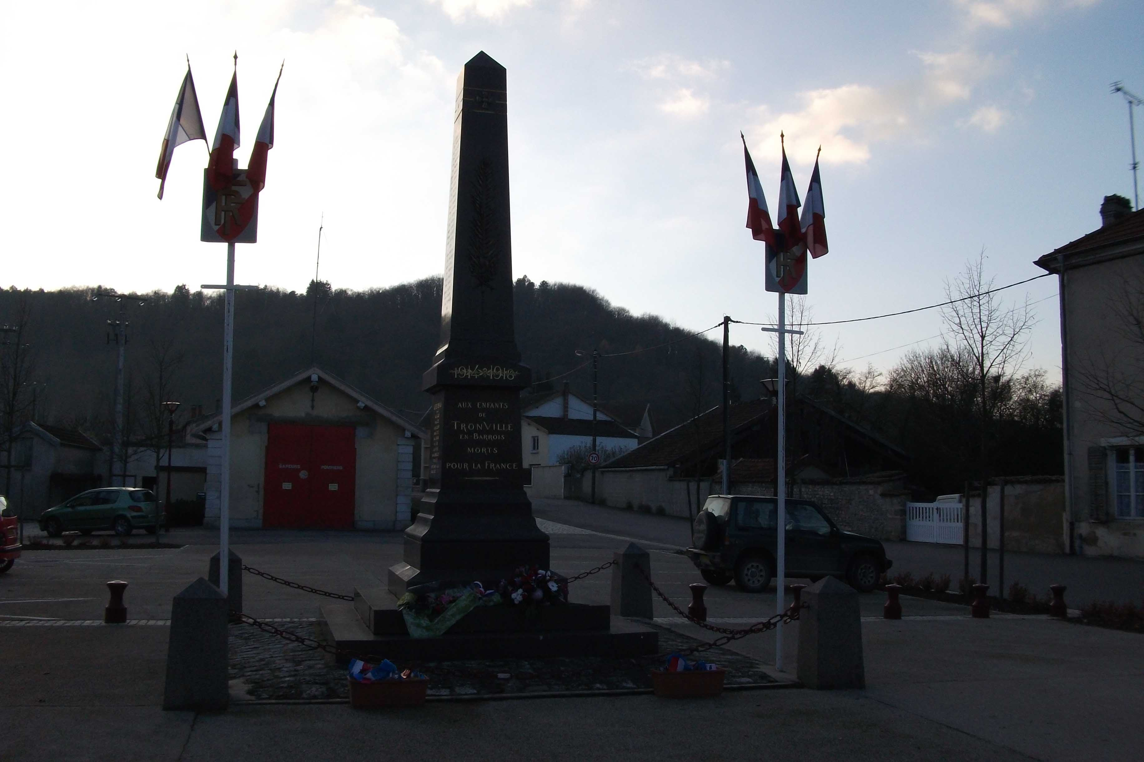 vue, à Tronville_en_Barrois_du monument_aux_morts et de la caserne de pompiers en arrière plan.